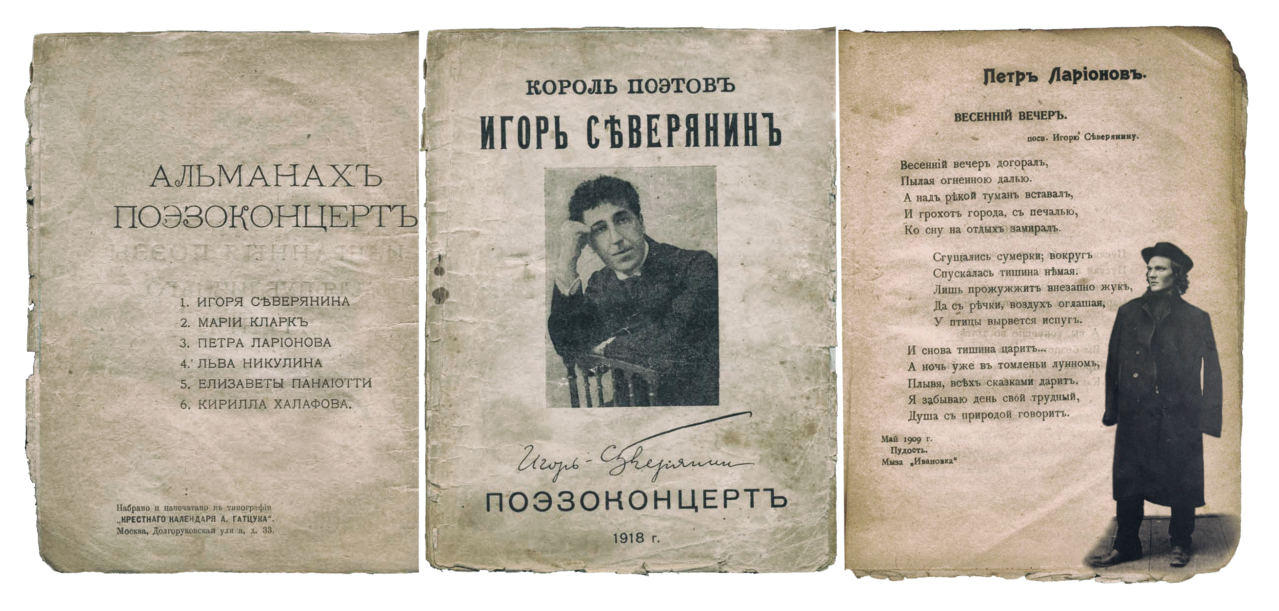 Ларионов, Петр Андреевич_Поэзоконцерт. М.: Типография "Крестного календаря" А. Гатцука, 1918 г.